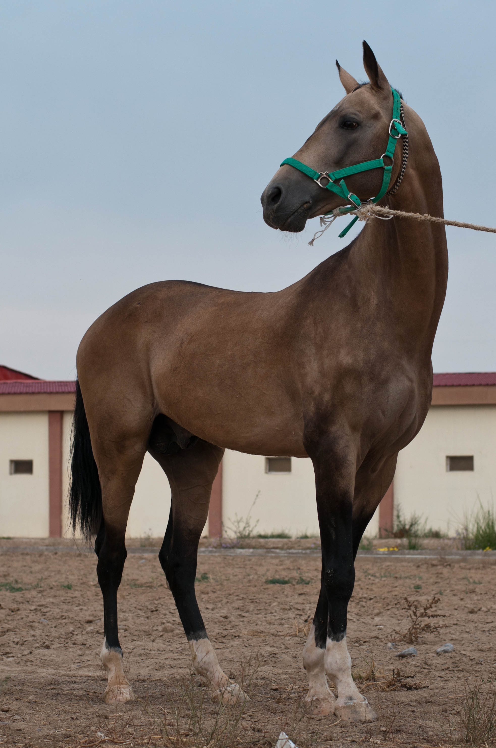 Studfarm in Turkmenistan